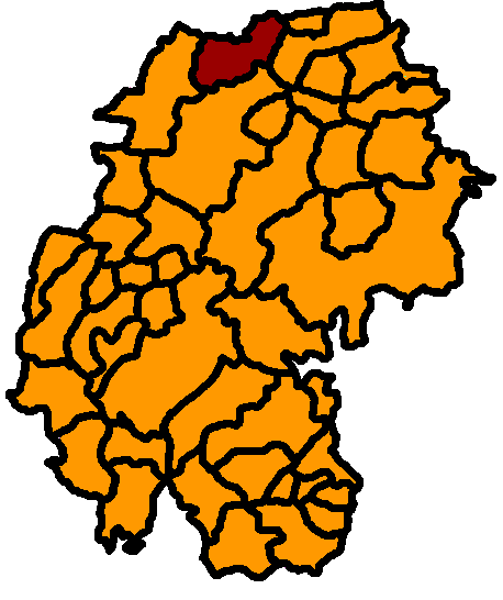 Ichtershausen hervorgehoben, Ilm-Kreis